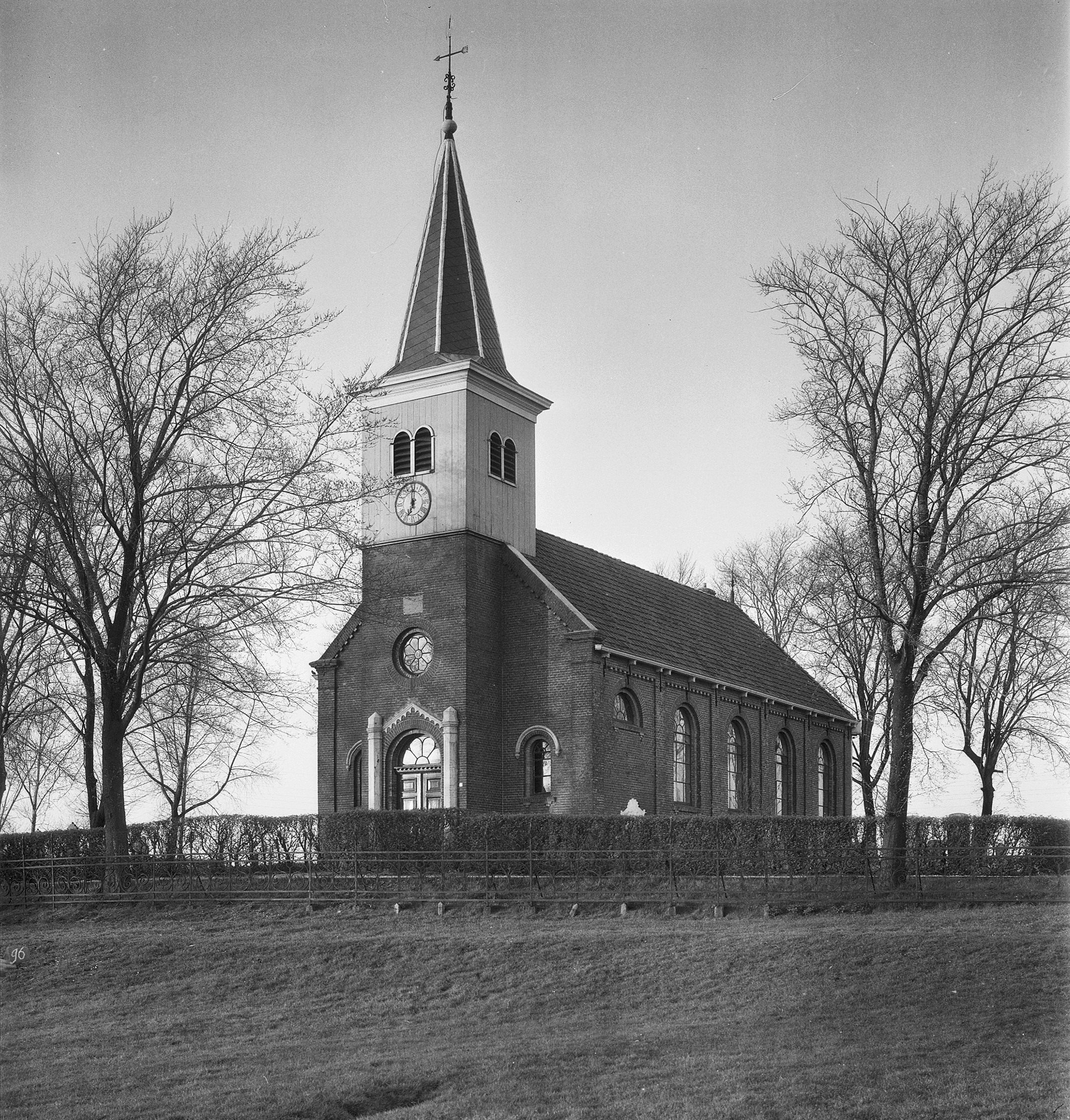 Nederlands Hervormde Kerk GOEIE: kerk Adres = Hidaard - Buorren 1 - anno 1873